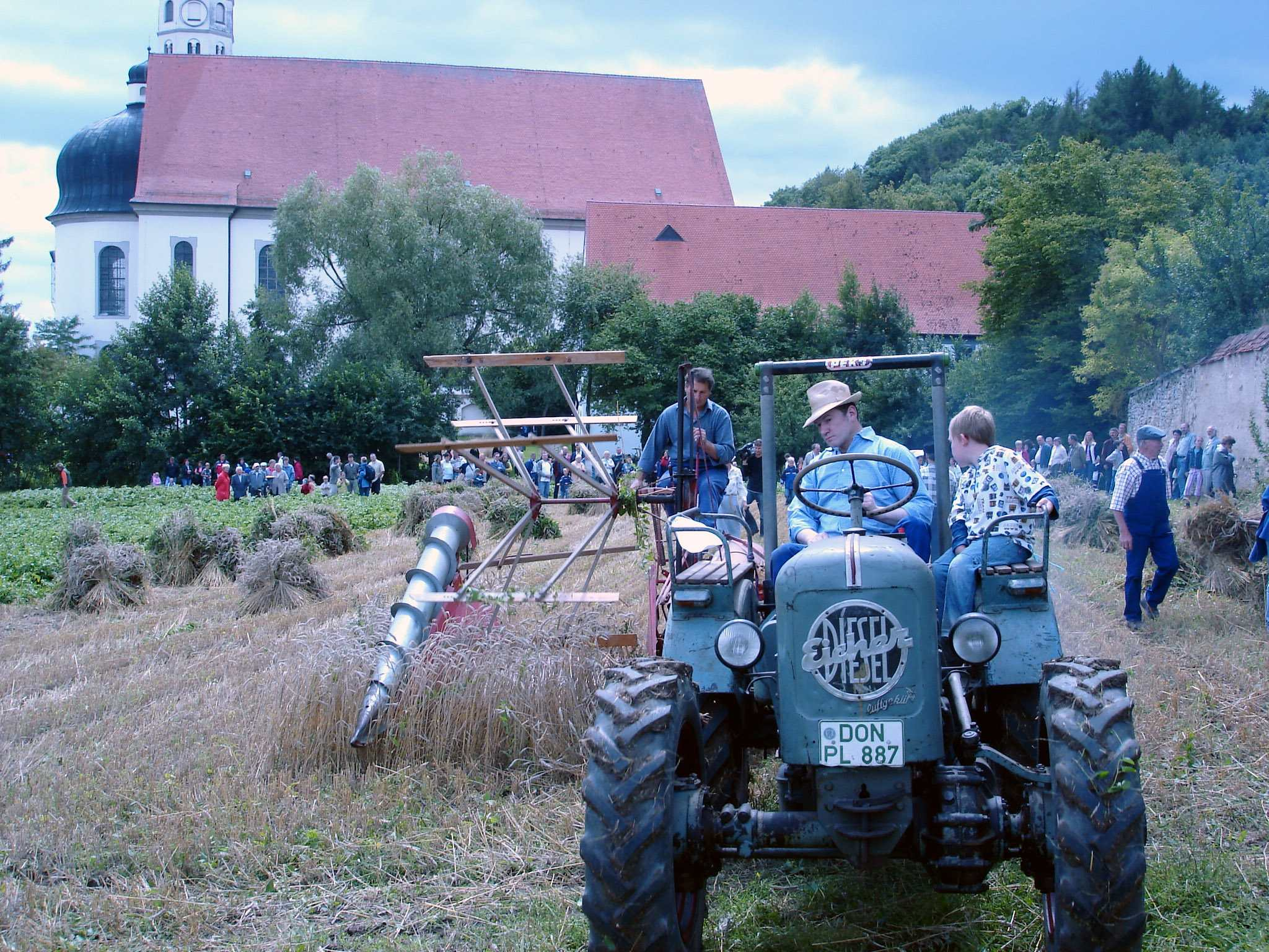 Eicher-Schlepper mit Mähbinder beim Schnitterfest, Maihingen